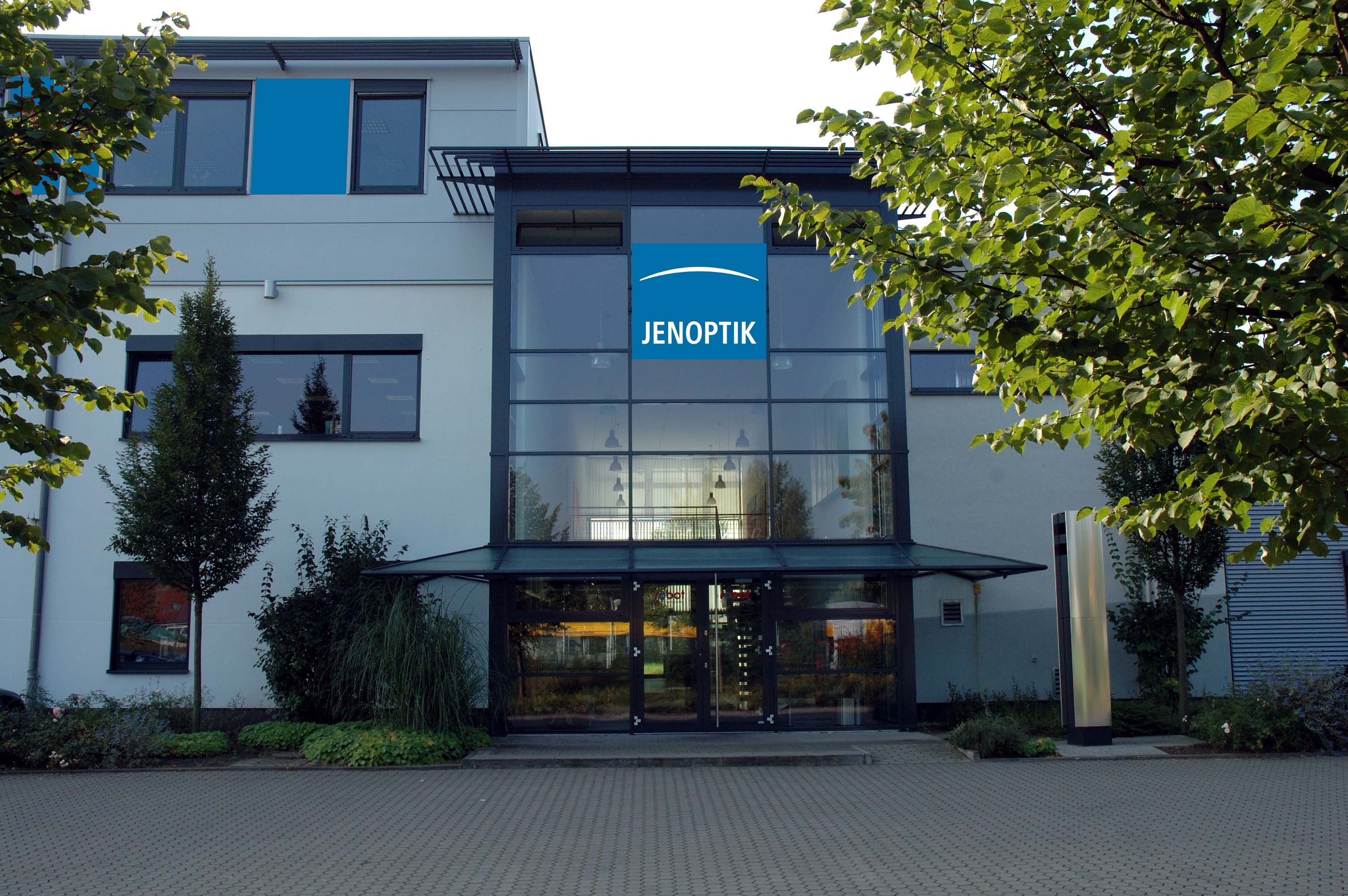 Haupteingang Jenoptik Robot Gebäude in Monheim am Rhein.